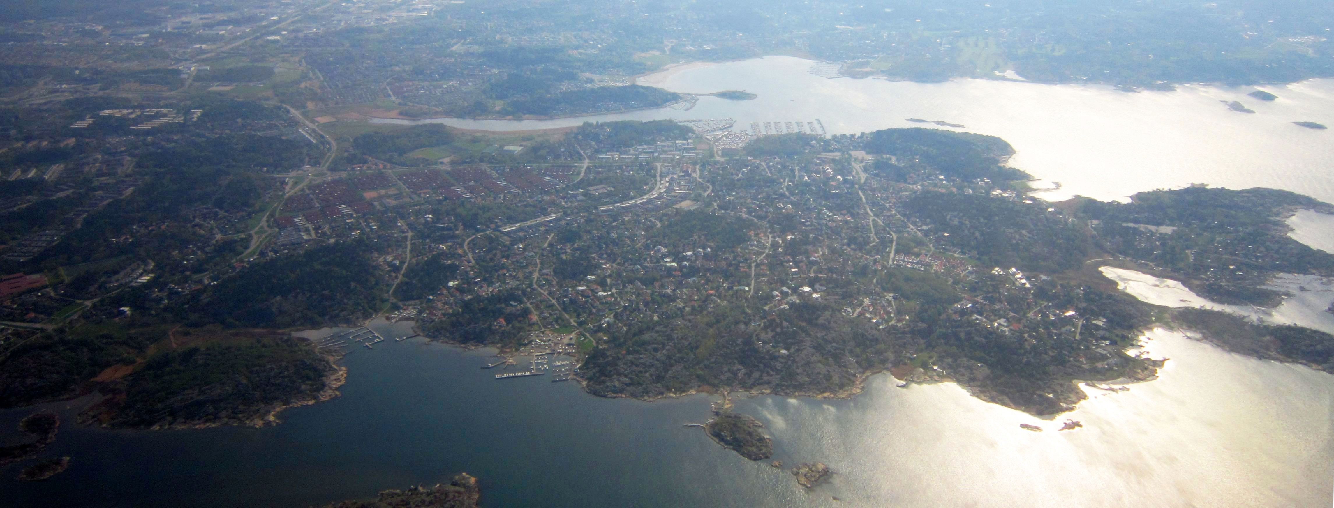 Flygfoto över Näset och Åkered i Tynnered